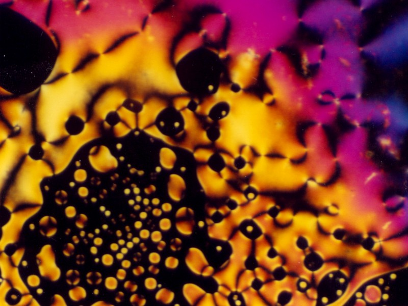 Tröpfchentextur (links unten) einer nematischen Phase, zu sehen ist eine Probe von 1,5-Pentandiol-bis{4-[4-(4-n-octyloxy-benzoyloxy)benzylidenamino]benzoat} knapp unterhalb ihres Klärpunktes bei ungefähr 245 °C, Flüssigkristall.